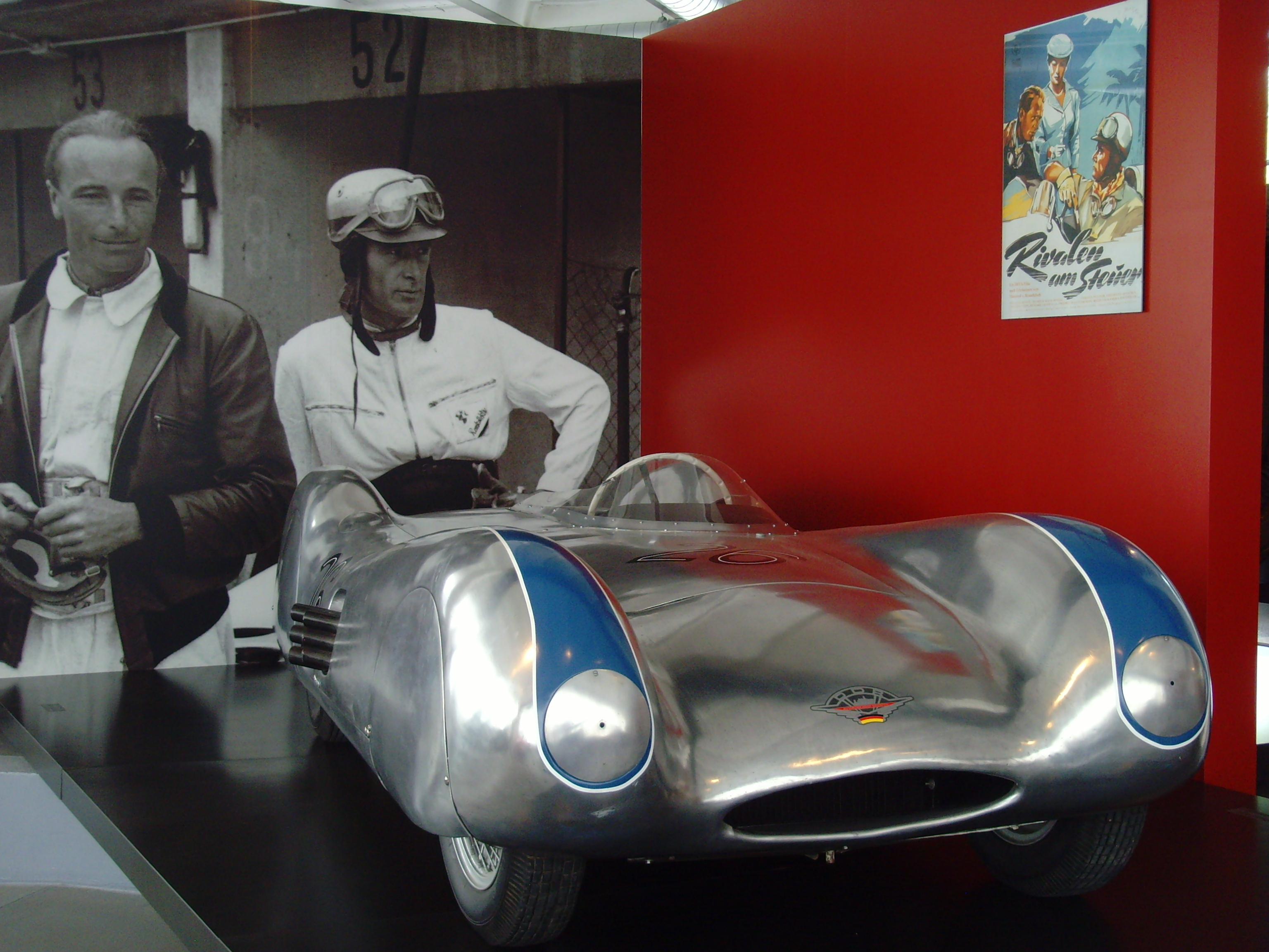 AWE R3 1,5l-Rennsportwagen 1956